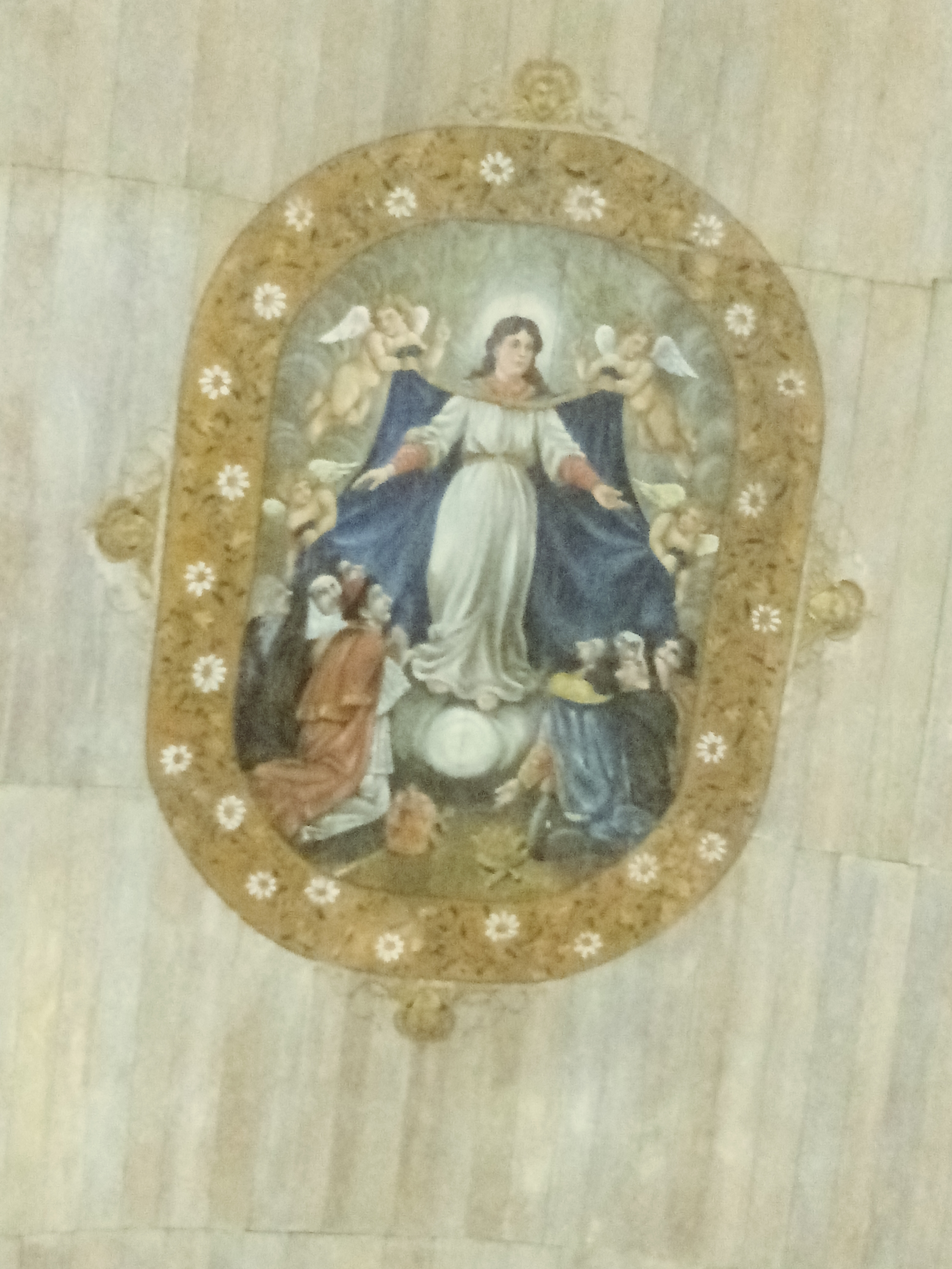 Teto esculpido e pintado da Igreja da Misericórdia em João Pessoa, na Paraíba